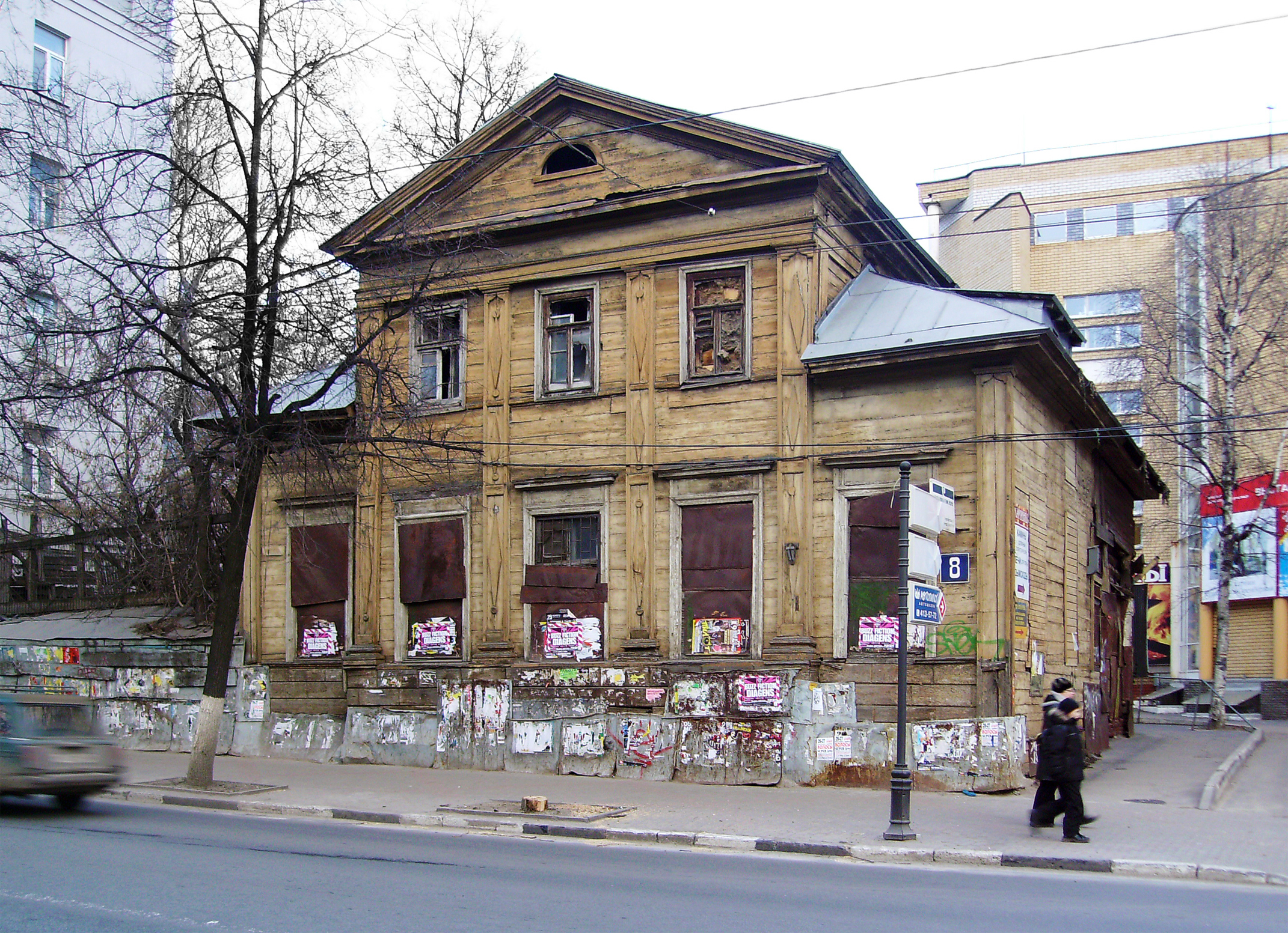 Улица Варварская, 8. Нижний Новгород. Бывший дом К. И. Ильиной - М. Ф. Щелокова